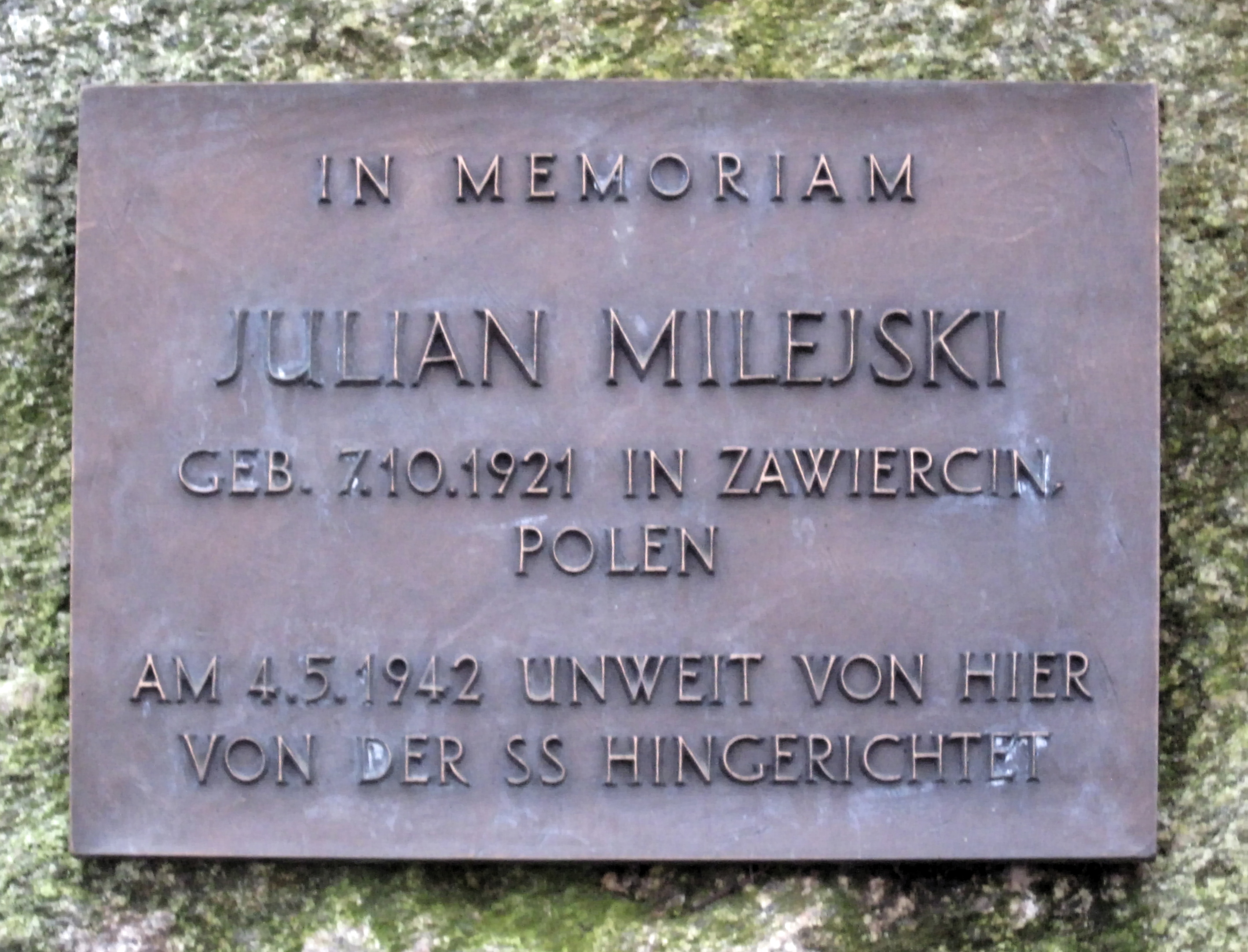 Gedenktafel an dem Gedenkstein für Julian Milejski in Stelle (Landkreis Harburg) in Niedersachsen, Deutschland